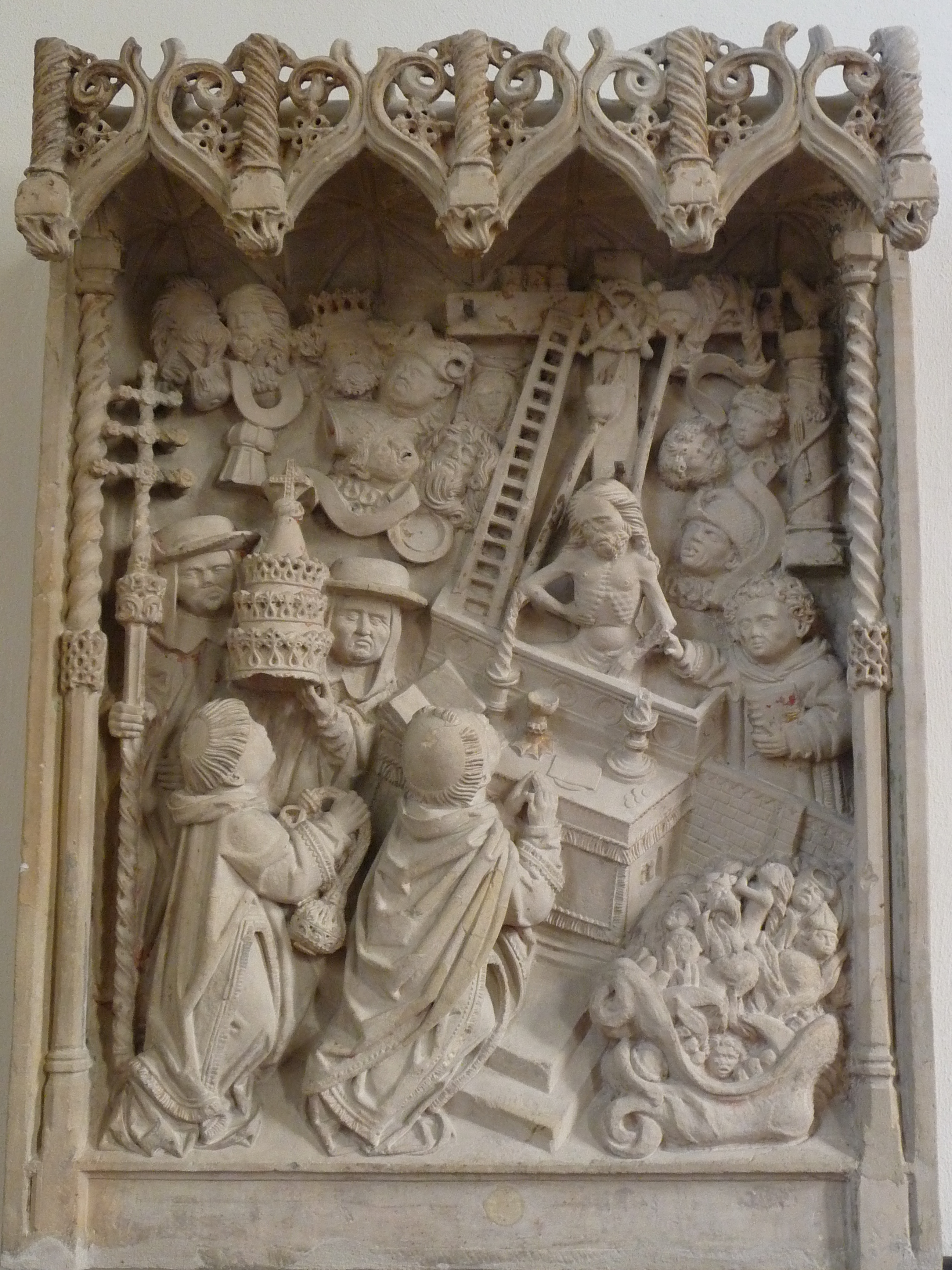 Sandsteinrelief der Gregoriusmesse aus dem Jahr 1500 in der katholischen Kirche St. Antonius in Gescher (Nordrhein-Westfalen, Deutschland)